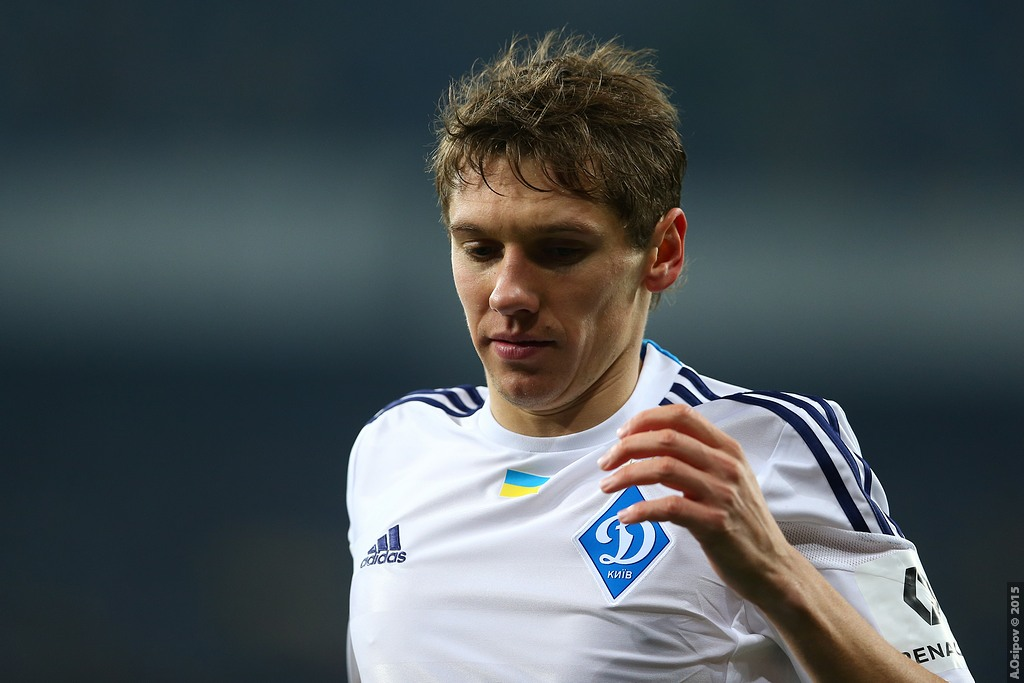 16.10.2015 г.Киев. НСК "Олимпийский". 11-й тур Лиги Пари-Матч. Динамо Киев - Шахтер Донецк - 0:3